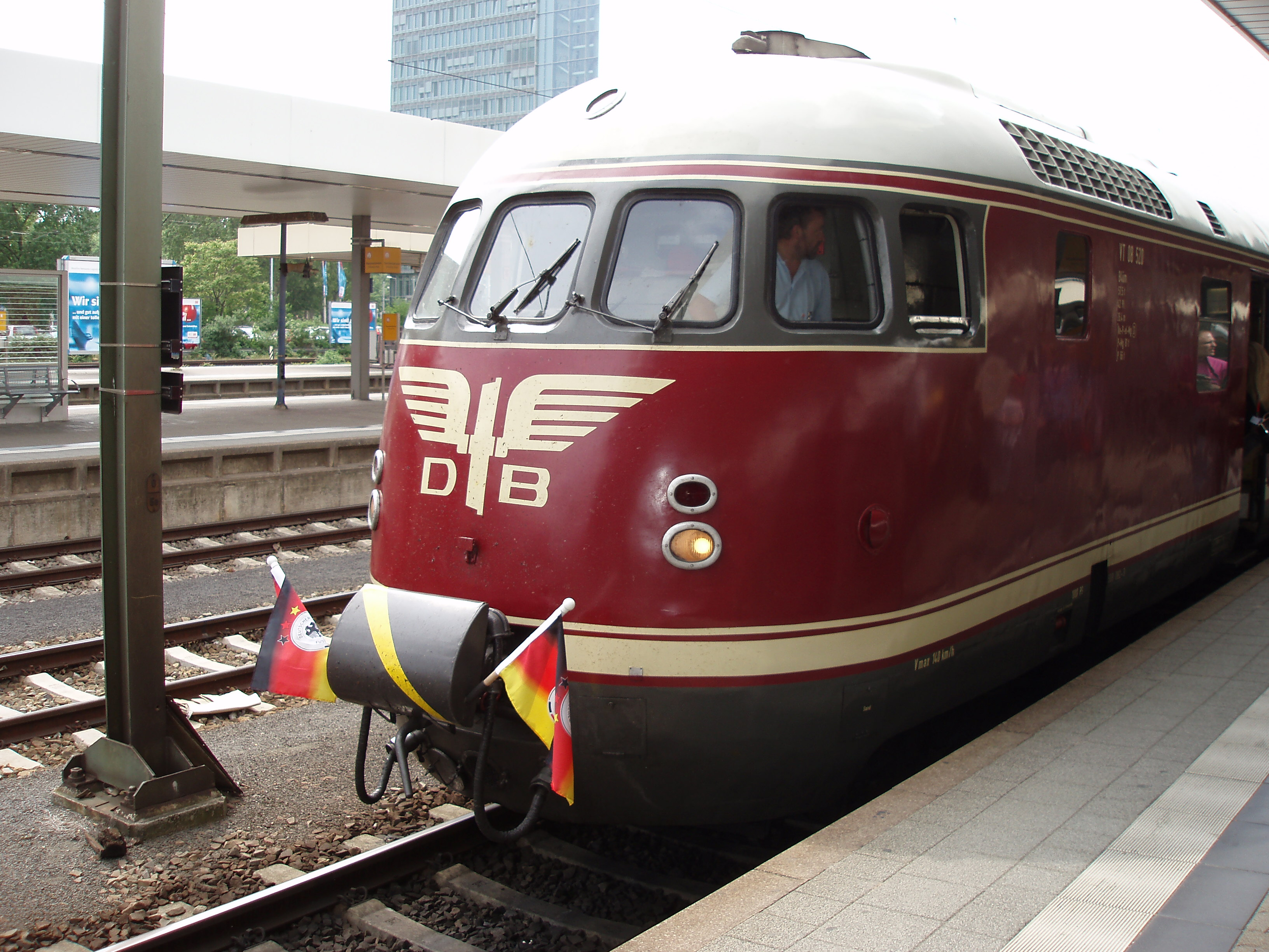 Weltmeisterzug 1954, vor dem Testspiel der deutschen Nationalmannschaft gegen den Verbandsligisten FSV Luckenwalde, Ort: Mannheim Hbf